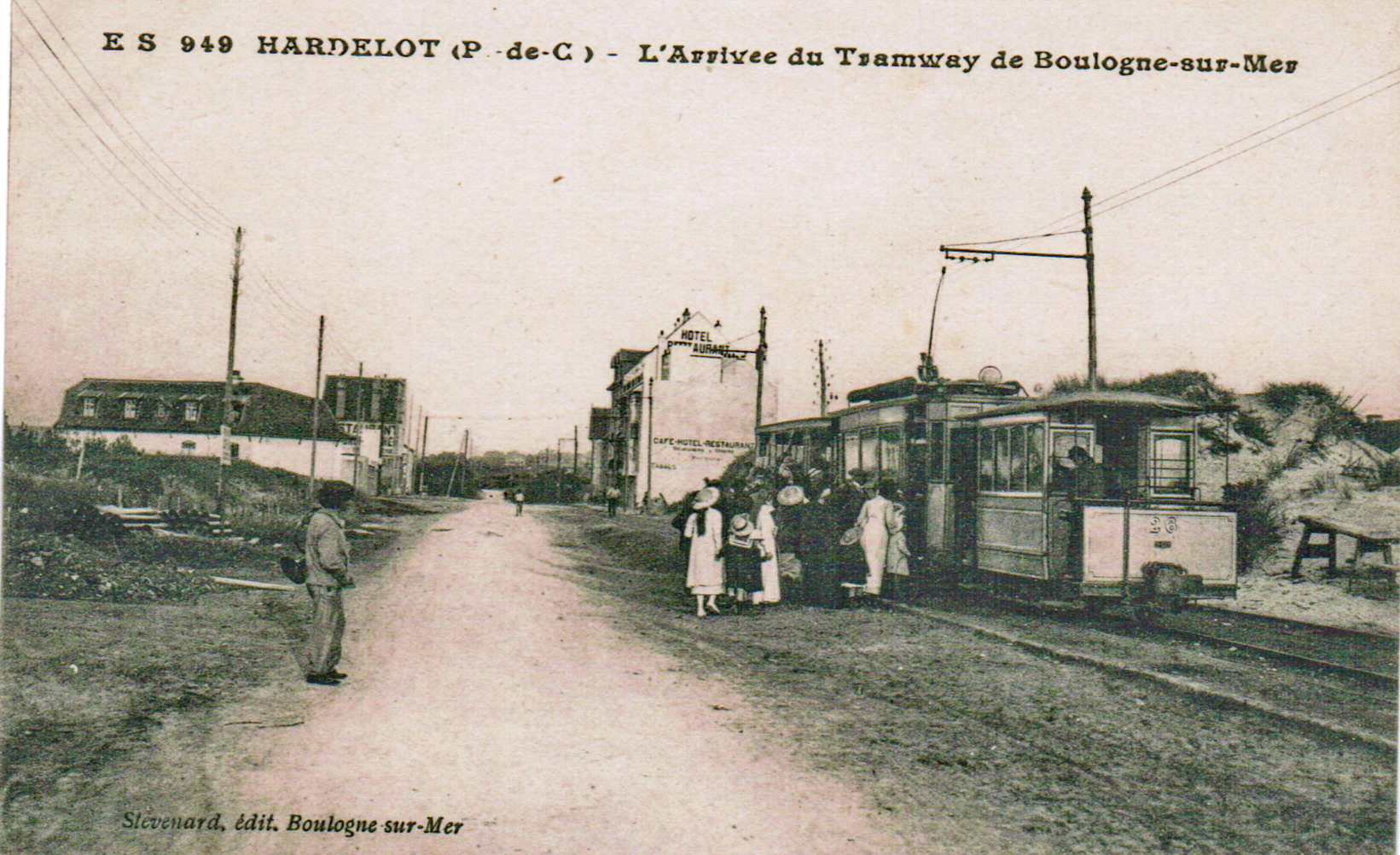 Carte postale ancienne éditée par ES n°949 Hardelot - L'arrivée du Tramway de Boulogne-sur-Mer